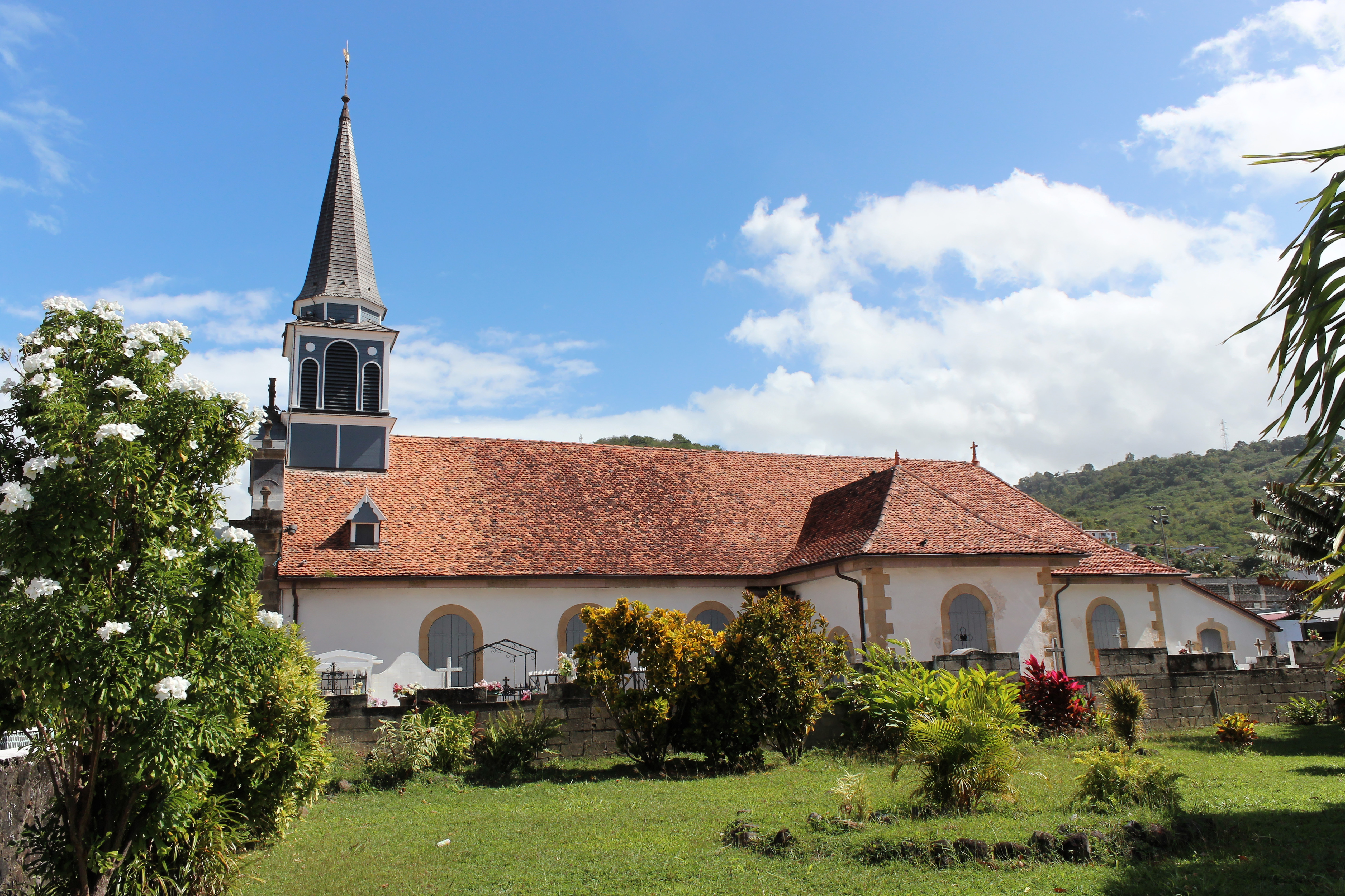 Église Notre-Dame-de-l'Assomption-et-Saint-Joseph, à Case-Pilote (Martinique), classée au titre des monuments historiques (réf. PA00105938)